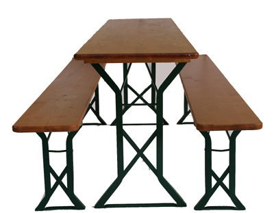 Eine Bierzeltganitur mit etwas mehr Beinfreiheit.